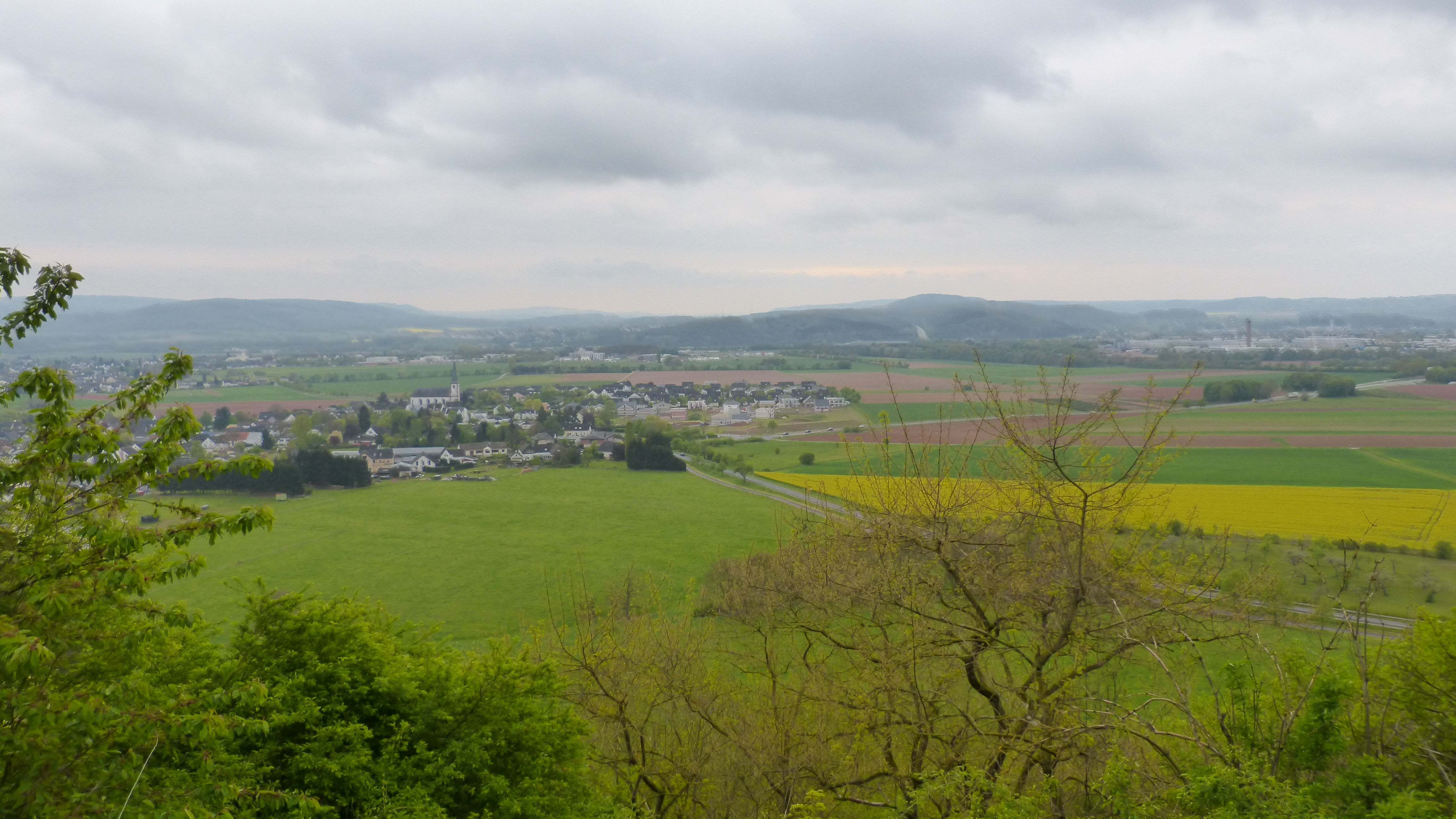 Links Stadtteil Bombogen, rechts Wittlich.